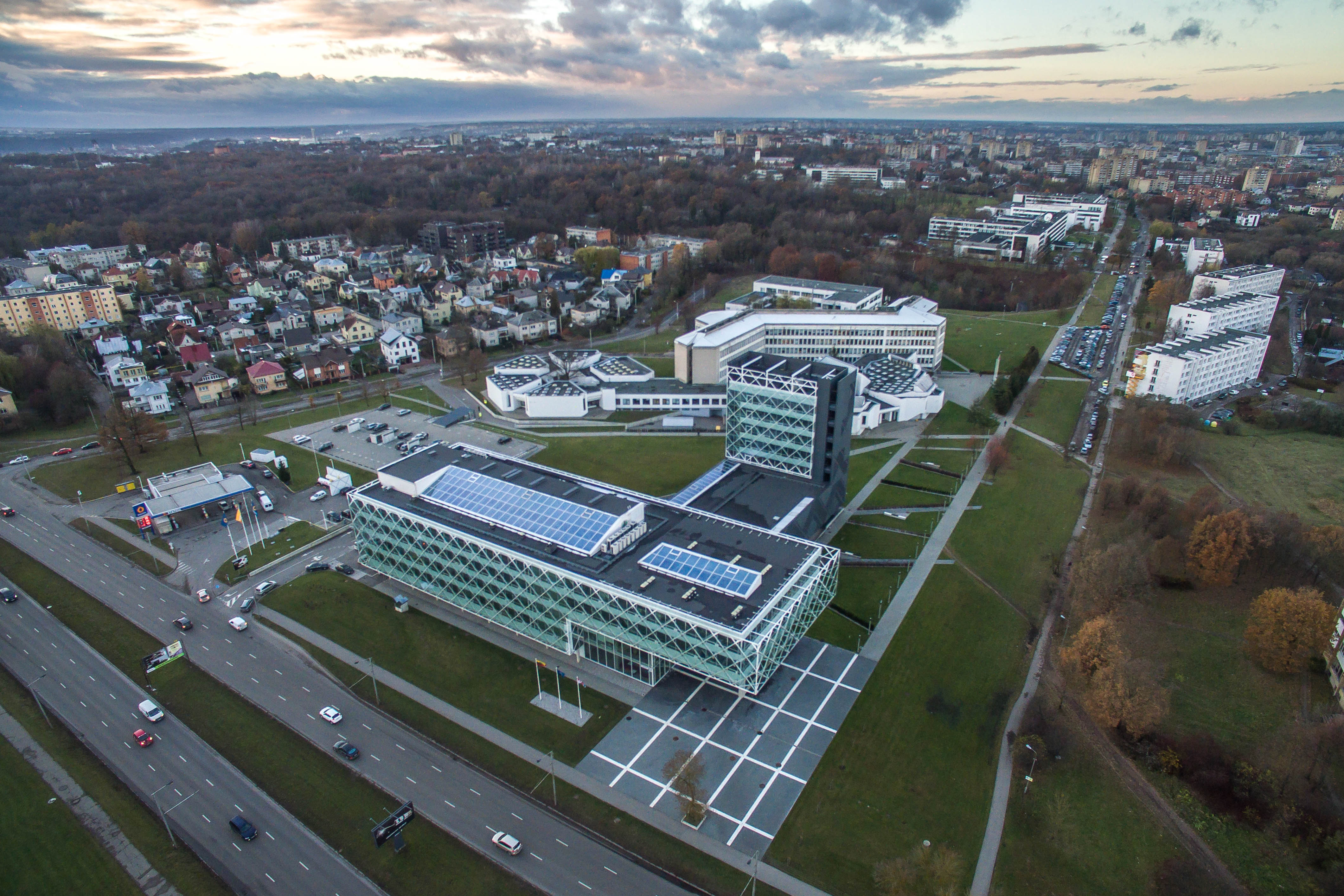 KTU studentų miestelis, 2017 m.